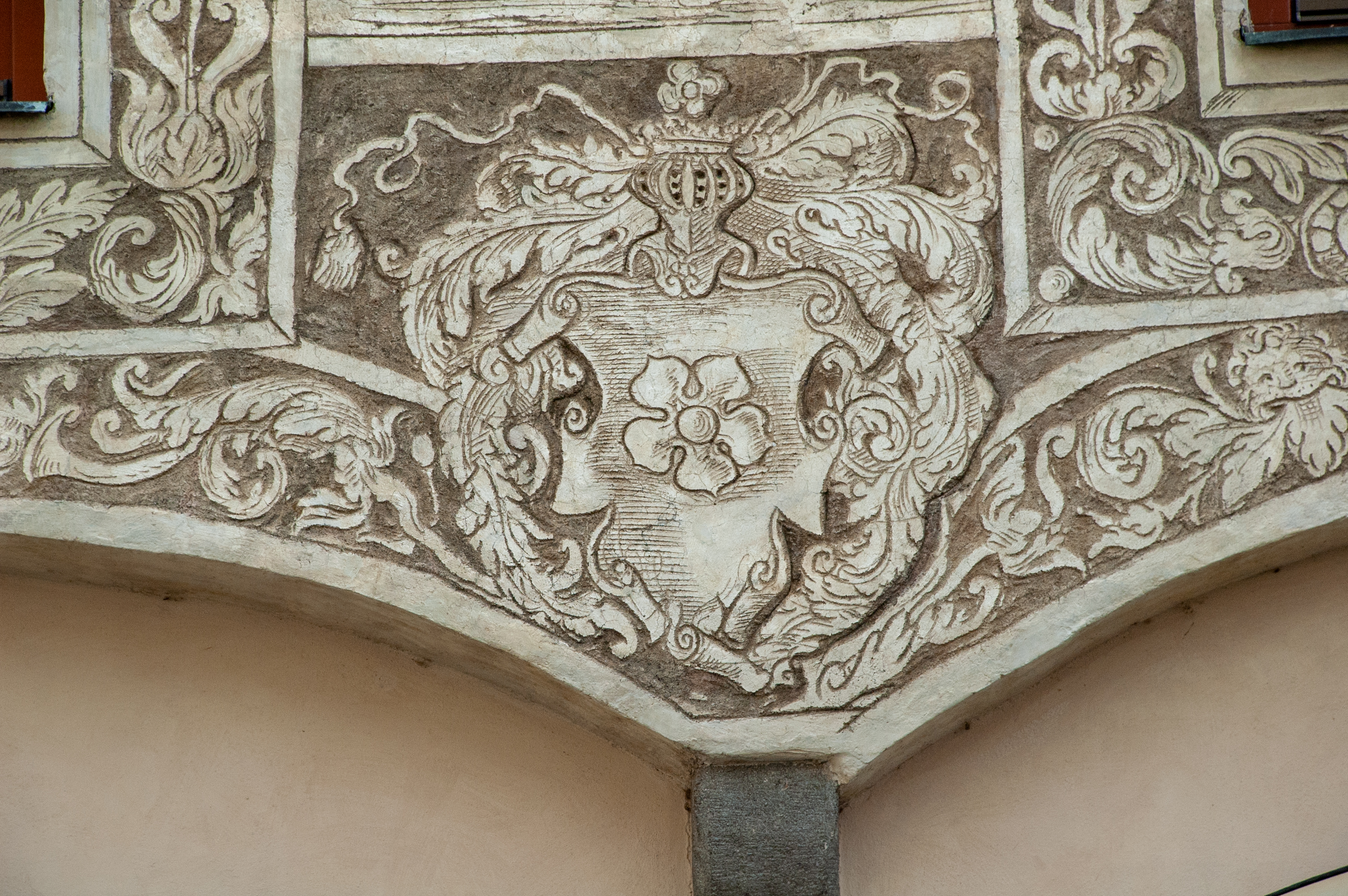 Velké náměstí 36, Prachatice